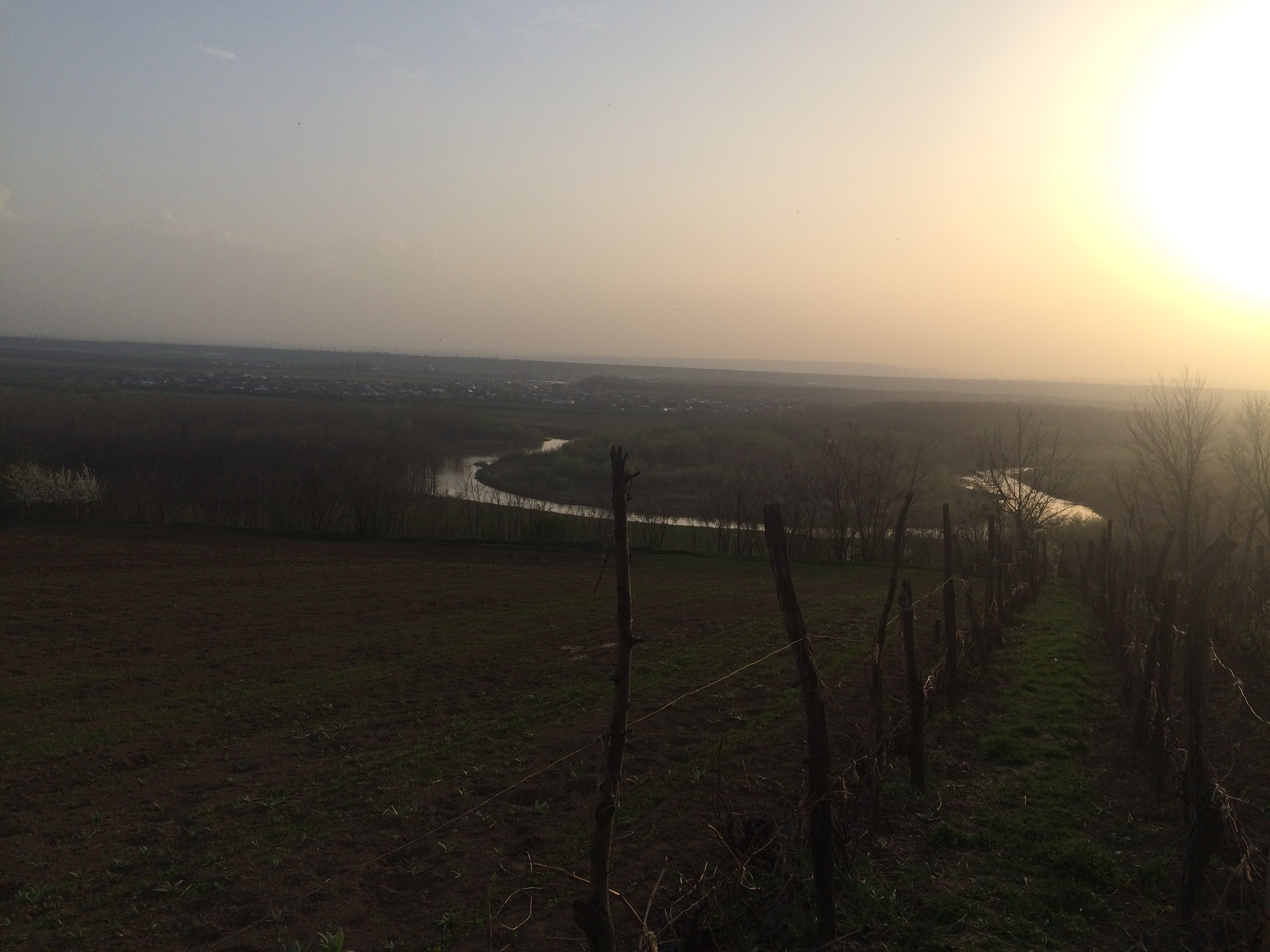 aprile 2016 valle del fiume visto dall'alto al tramonto